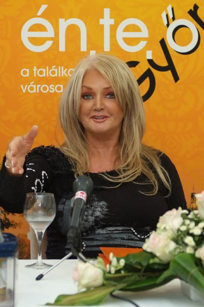 Bonnie Tyler Győrben sajtótájékoztatón.